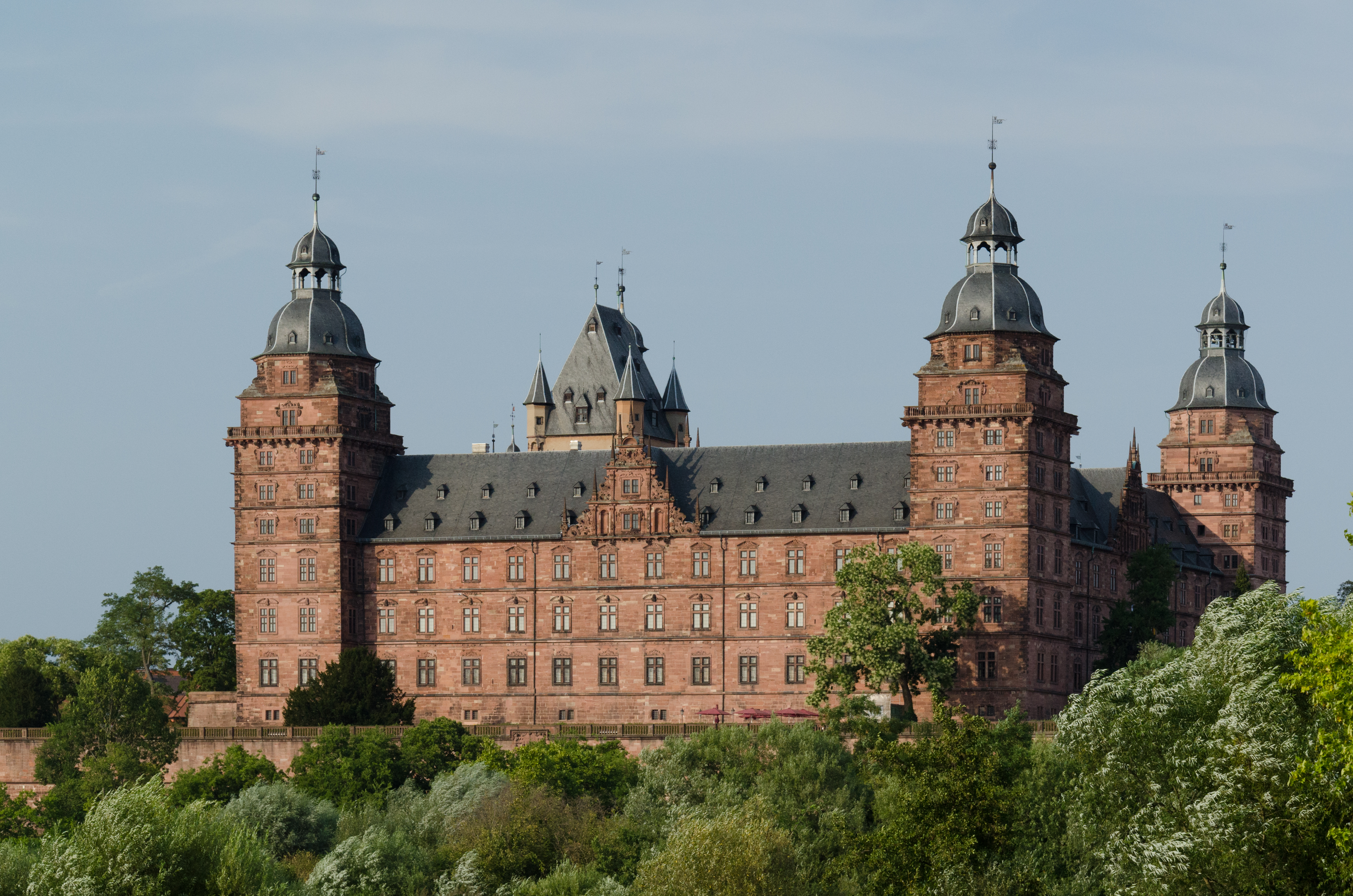 Aschaffenburg, Schloss Johannisburg, 09-08-2